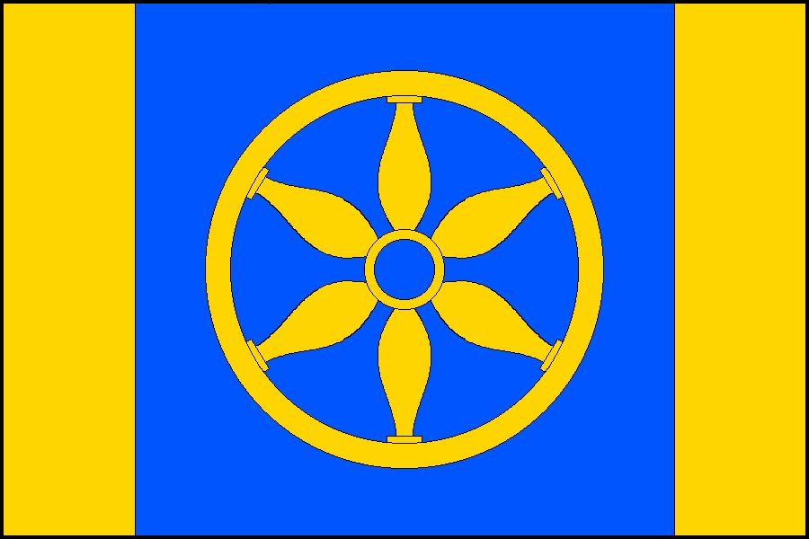 Vlajka obce Koloveč